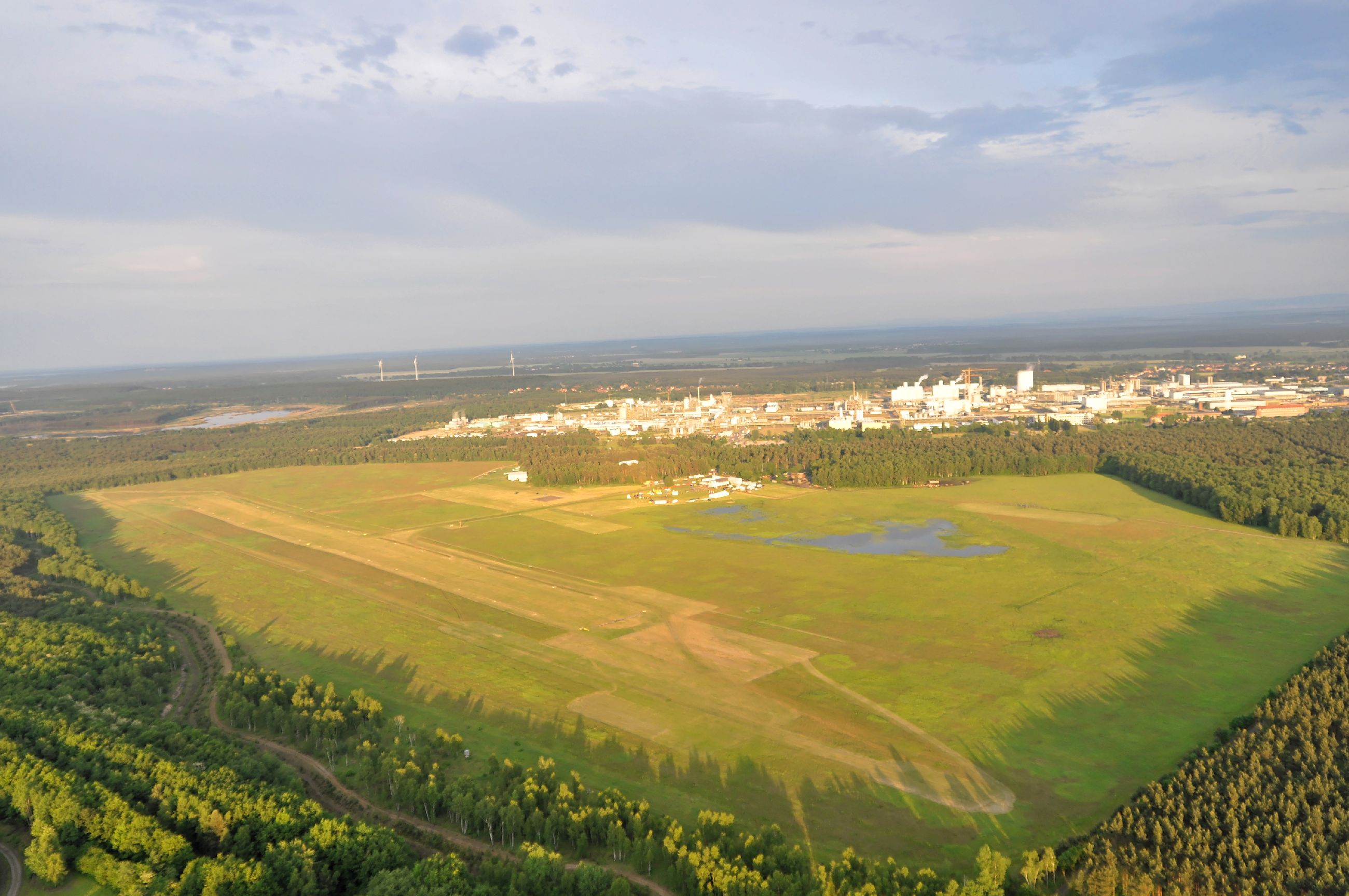 Luftaufnahme vom Flugplatz Schwarzheide-Schipkau im Hintergrund die BASF Schwarzheide; Bilder von den Lausitz Luftsport- & Techniktage 2013 am Flugplatz Schwarzheide-Schipkau